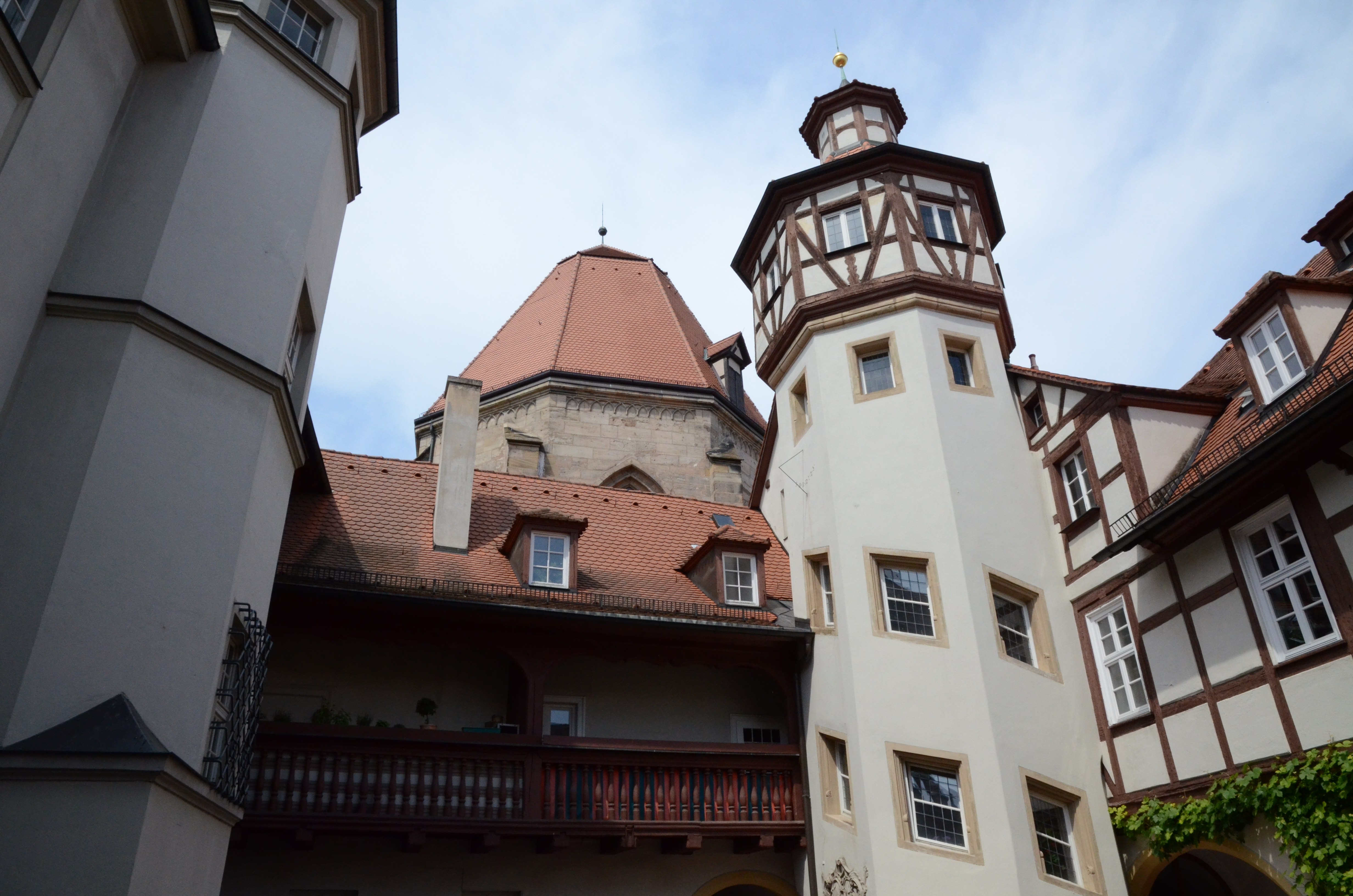 Ansbach, Johann-Sebastian-Bach-Platz 5